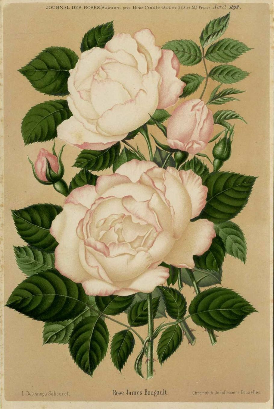 Rosier hybride remontant 'James Bougault' (Renault, 1892), illustration de Cécile Descamps-Sabouret dans le Journal des roses d'avril 1892.